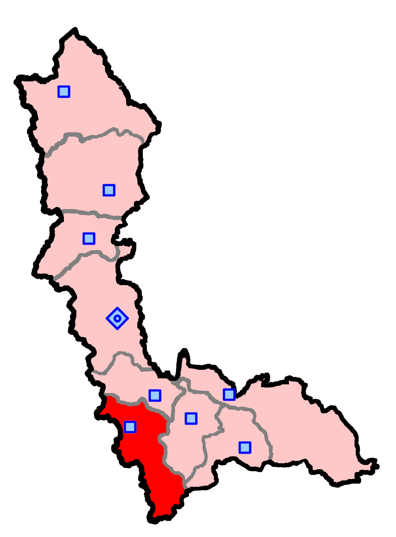 حوزهٔ انتخاباتی پیرانشهر و سردشت برای انتخابات مجلس شورای اسلامی